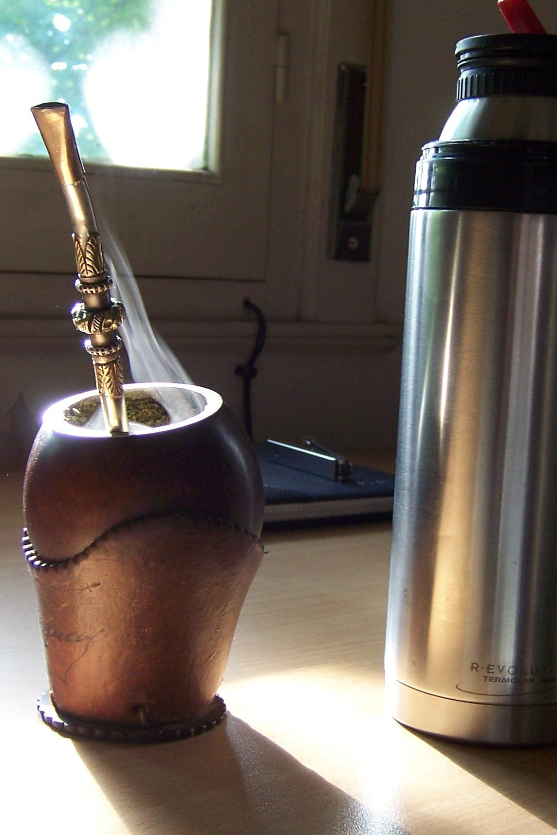 Mate (bebida) y termo sobre el escritorio.